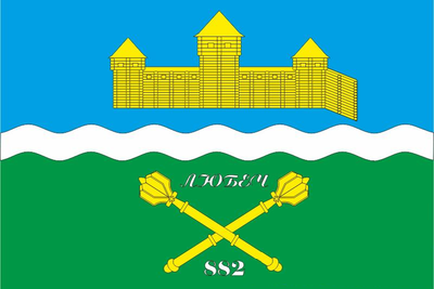 Прапор Любеча